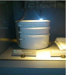 Et billede af en madspand.